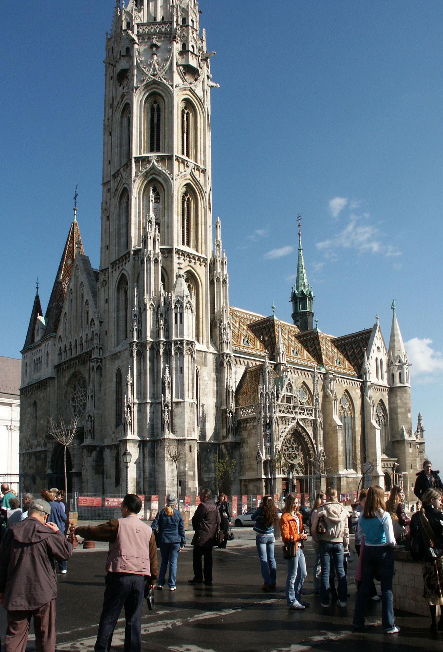 Hallkirke, San Stefan, Budapest